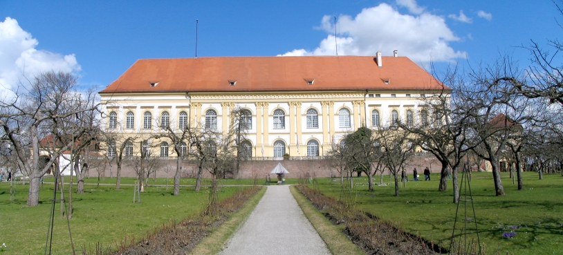 Schloss Dachau/ Castle Dachau Author: Patrick Huebgen Date: April 2006 Camera: Canon Powershot S1